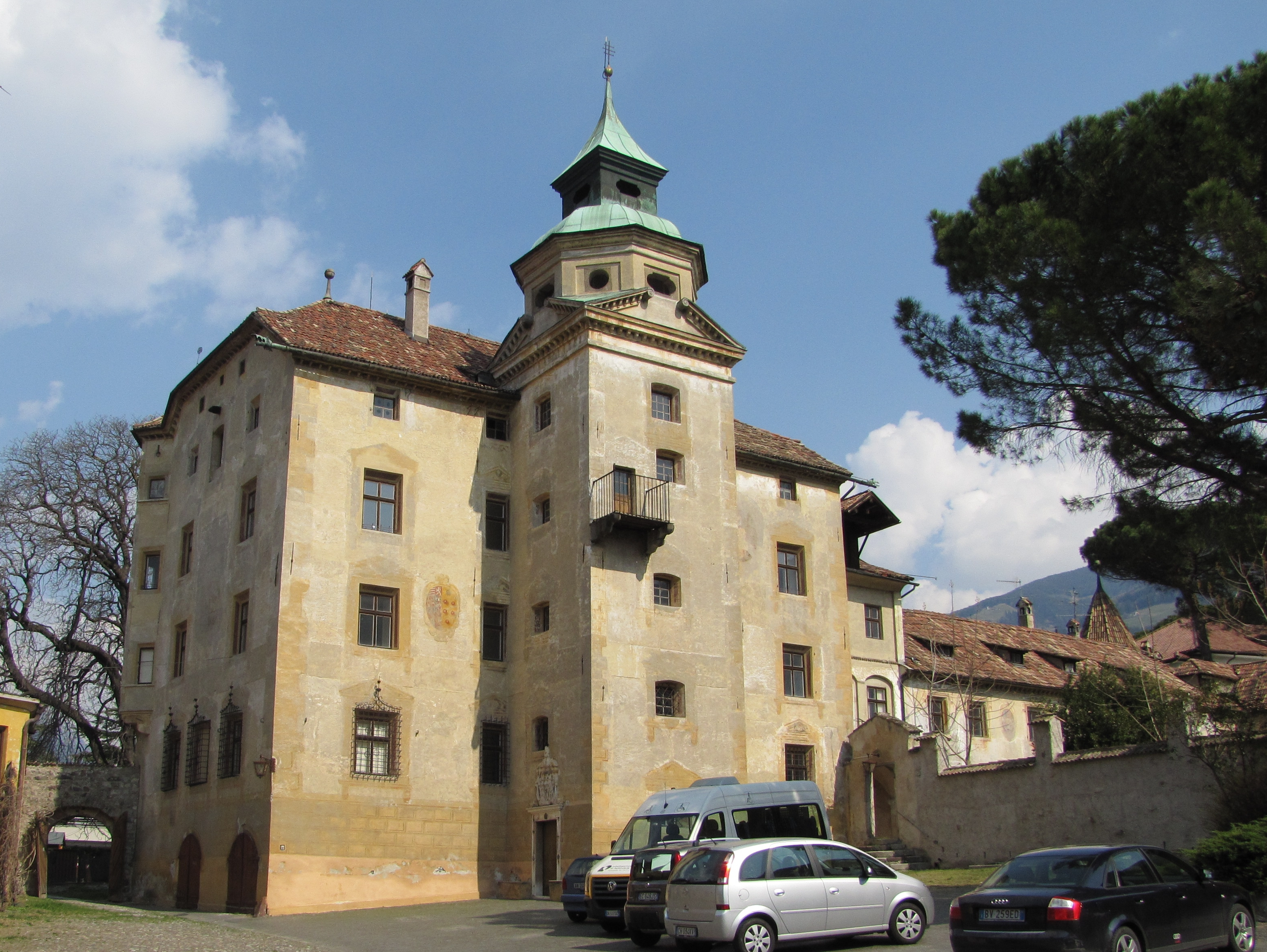 Winkel